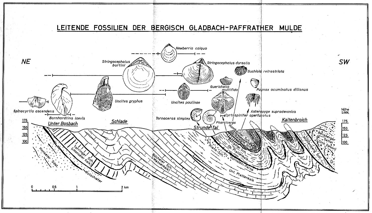 Saigerriss der Bergisch Gladbach-Paffrather Kalkmulde